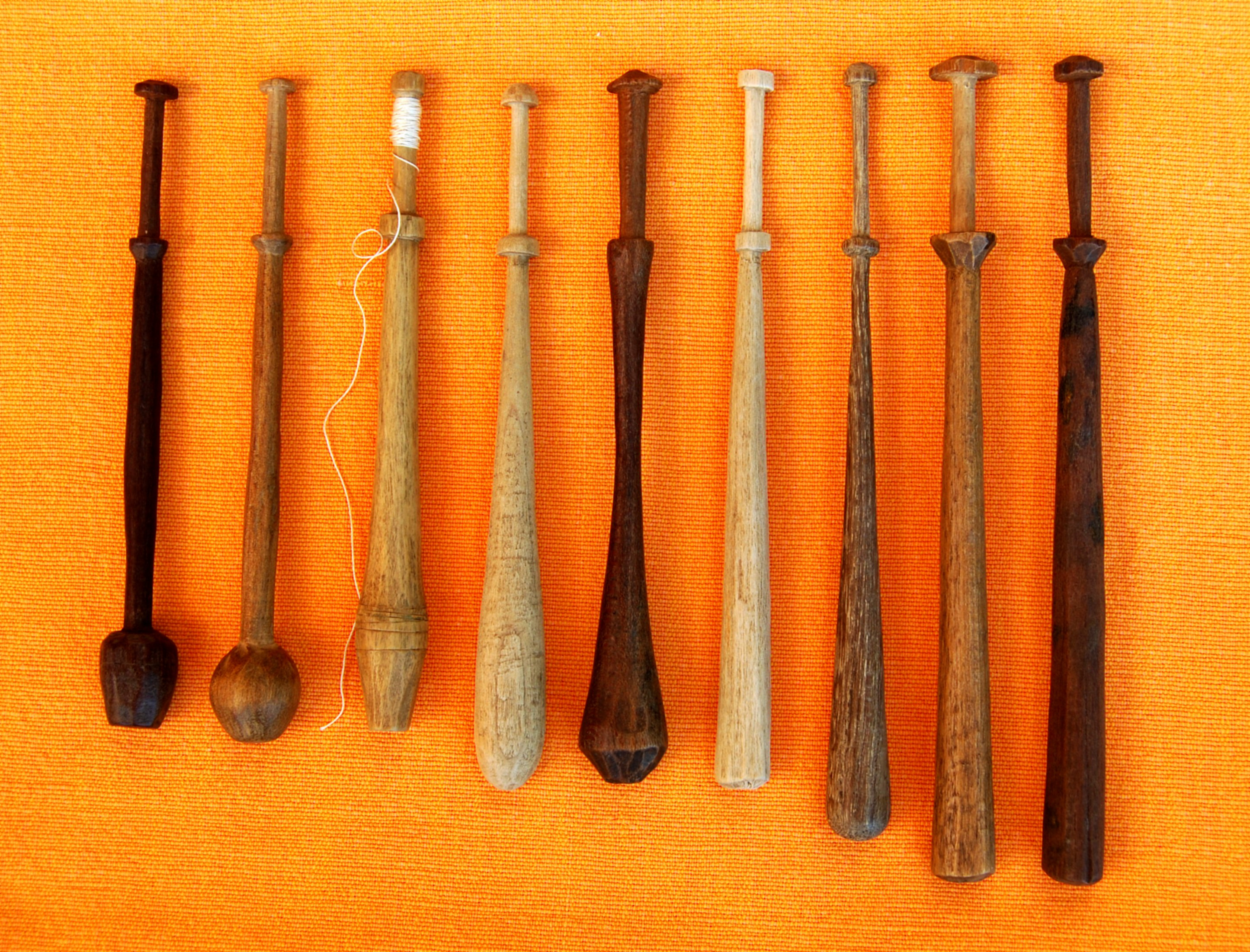 Paličky na pletenie tylových čipiek z Brezovej pod Bradlom.